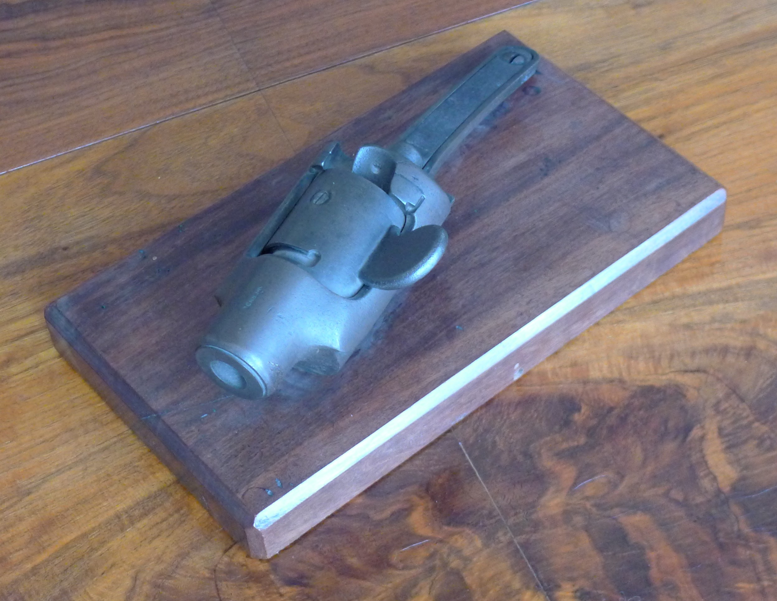 Modell des Tabernakelverschlusses beim Hinterladergewehr (geschlossen)